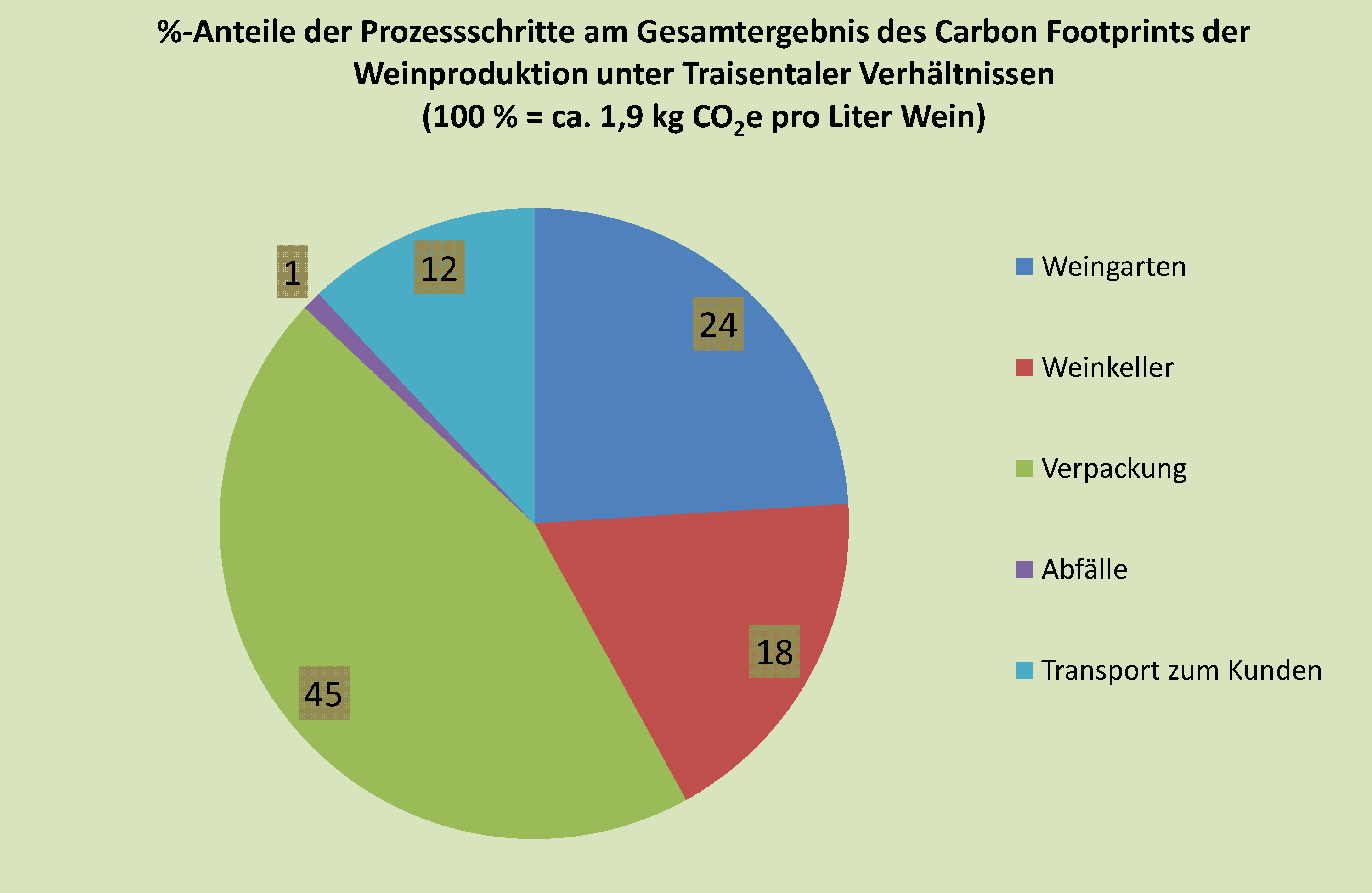 %-Anteile der Prozessschritte am Gesamtergebnis des Carbon Footprints der Weinproduktion